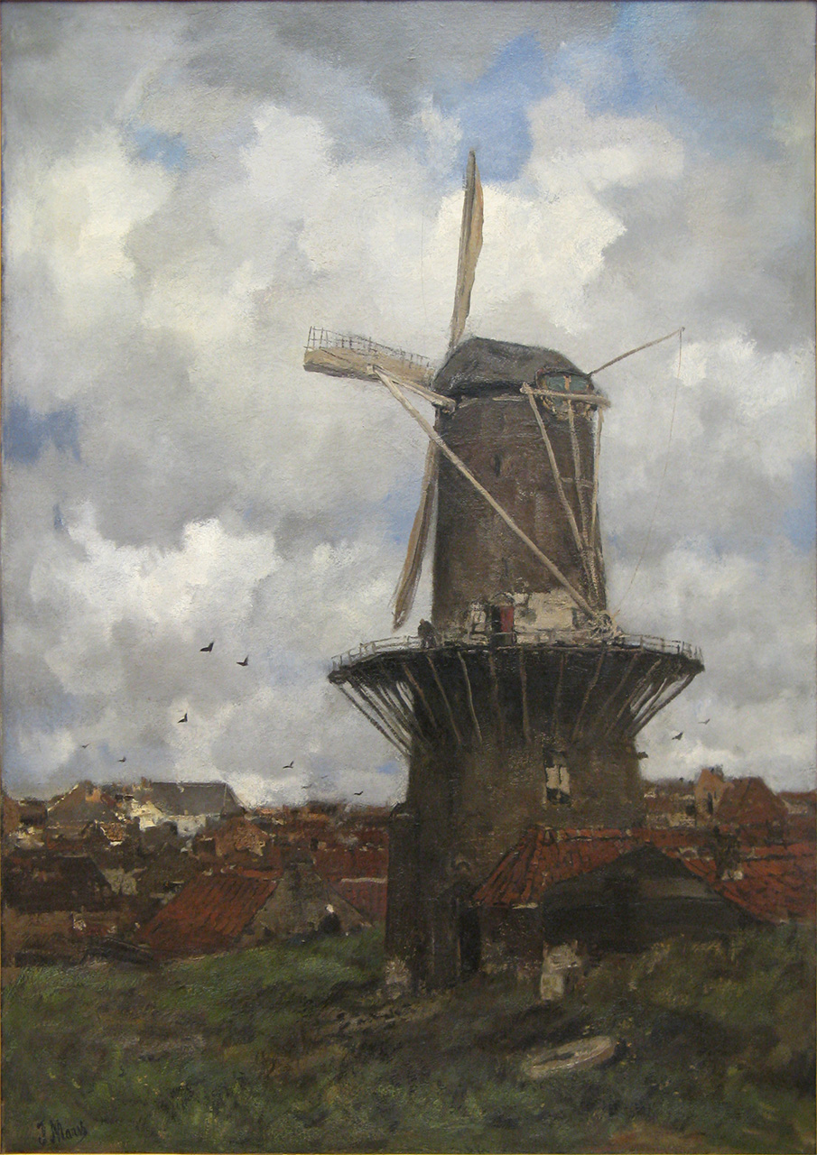 Stenen molen / Jacob Maris (1837 - 1899). – datering onbekend , 0333771 Jacob Maris (1837-1899) datering onbekend